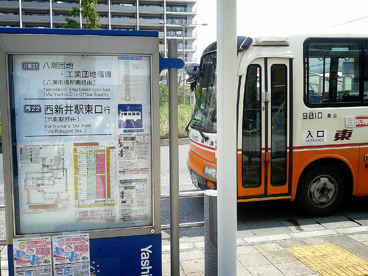 八潮駅に到着する「西22西新井駅行き」